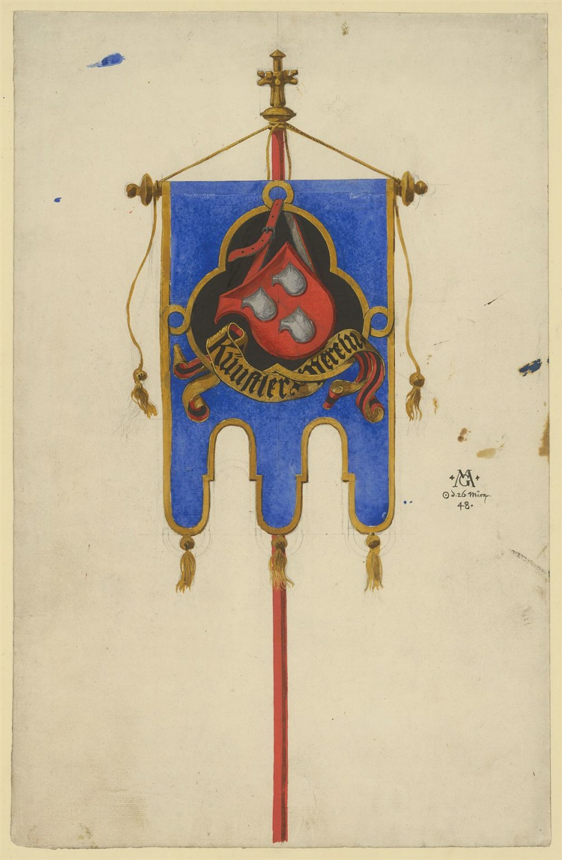 Entwurf eines Banners für den Hamburger Künstlerverein, 1848. Aquarell über Bleistift mit Höhungen in Hellgelb, 47,8 × 31,1 cm (Blatt), Hamburger Kunsthalle, Kupferstichkabinett. Inv. Nr. 45079. Sammlung: Zeichnungen, Hamburg, 19. Jh.